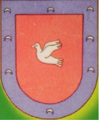 Escudo de la localidad de Santa Colomba de Sanabria, en España.